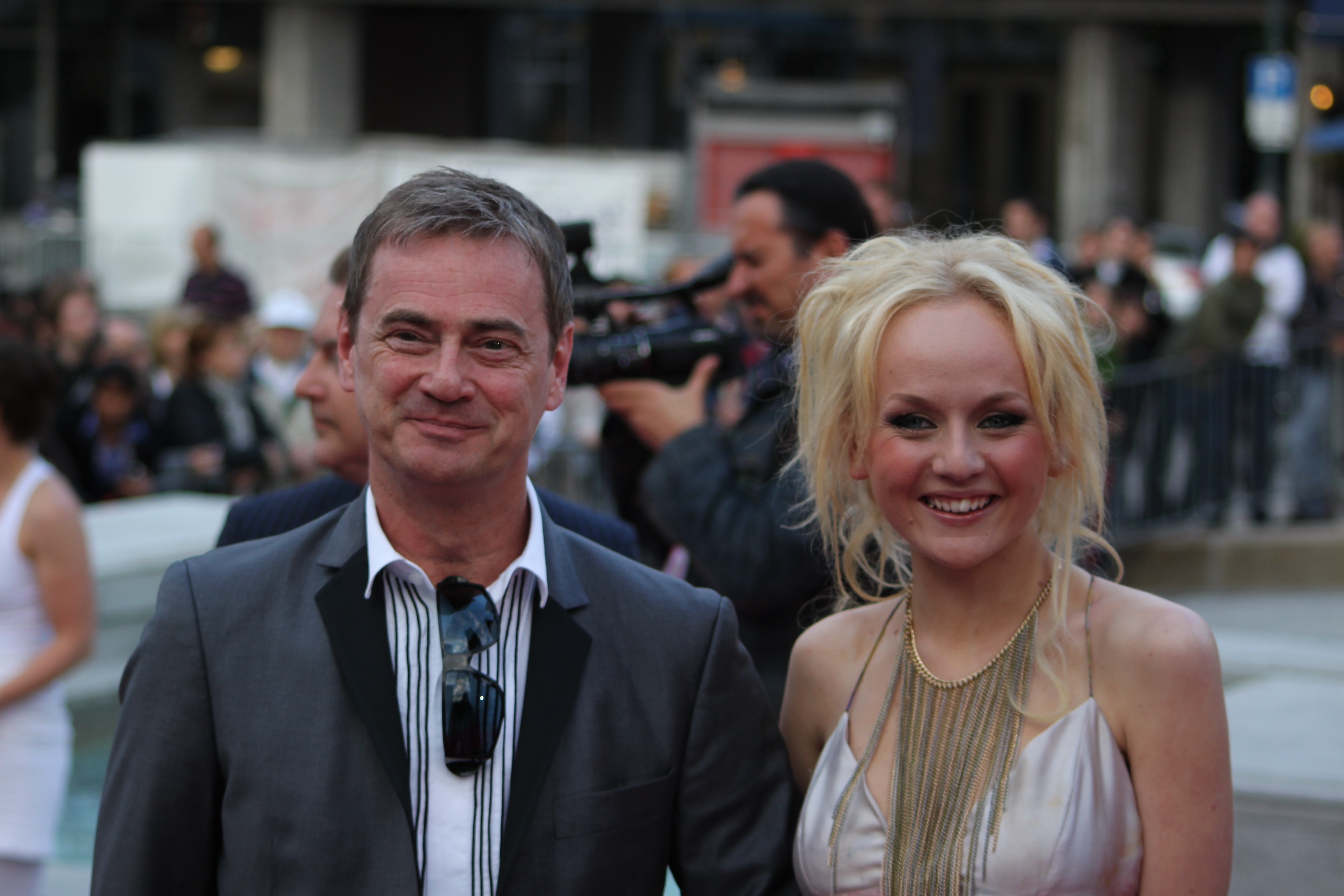 Foto: Vincent Hasselgård, Aktiv I Oslo.no